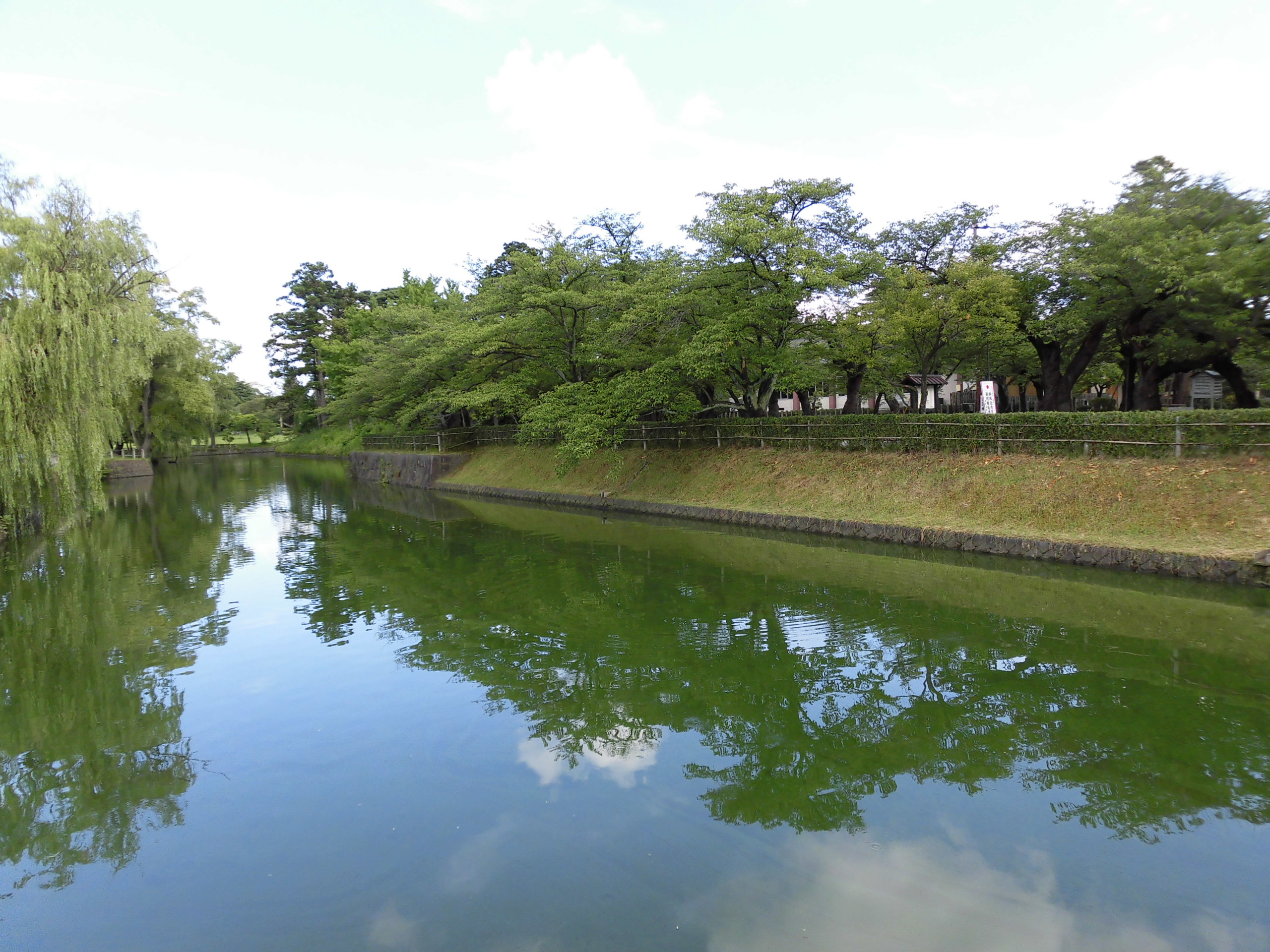 鶴岡公園。山形県鶴岡市に所在。鶴ヶ岡城跡。